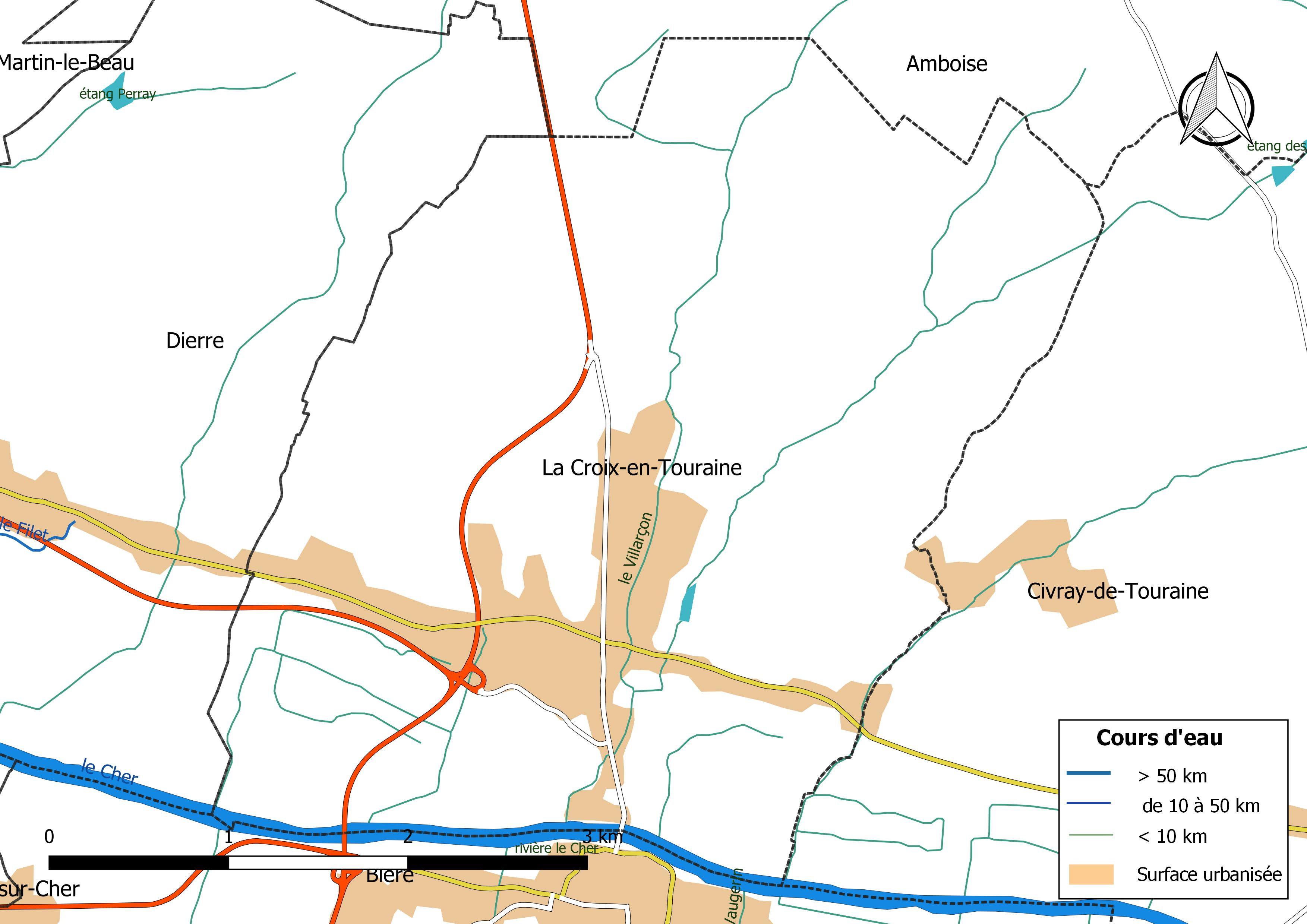 Carte du réseau hydrographique de la commune de La Croix-en-Touraine (France).